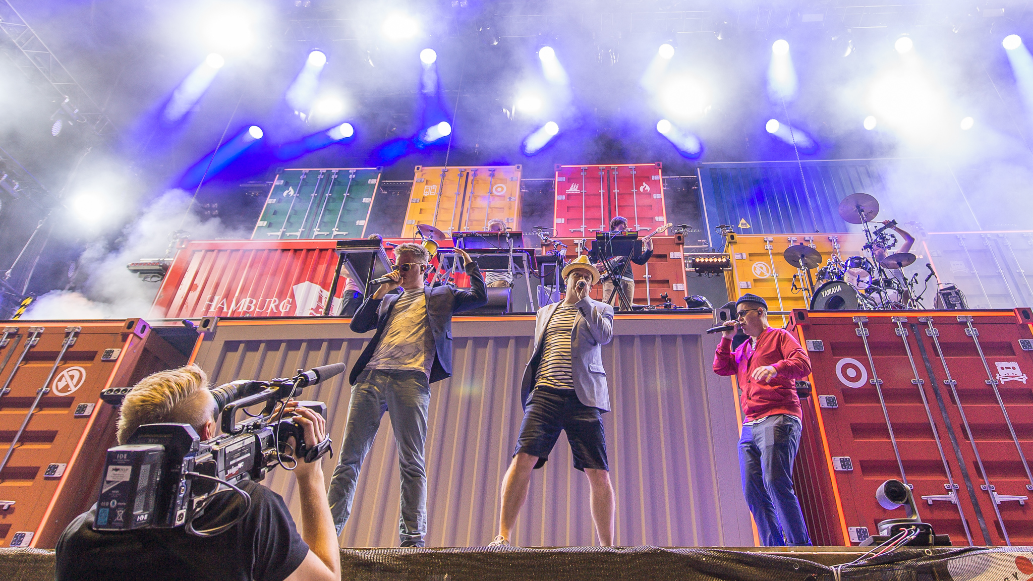 ARGO-Konzerte,Beck's Park Stage,Björn Beton,Björn Warns,Boris Lauterbach,Dokter Renz,Festival,Fettes Brot,Konzert,König Boris,Livekonzert,Livemusik,Martin Vandreier,Musik,RiP,Rock im Park 2016